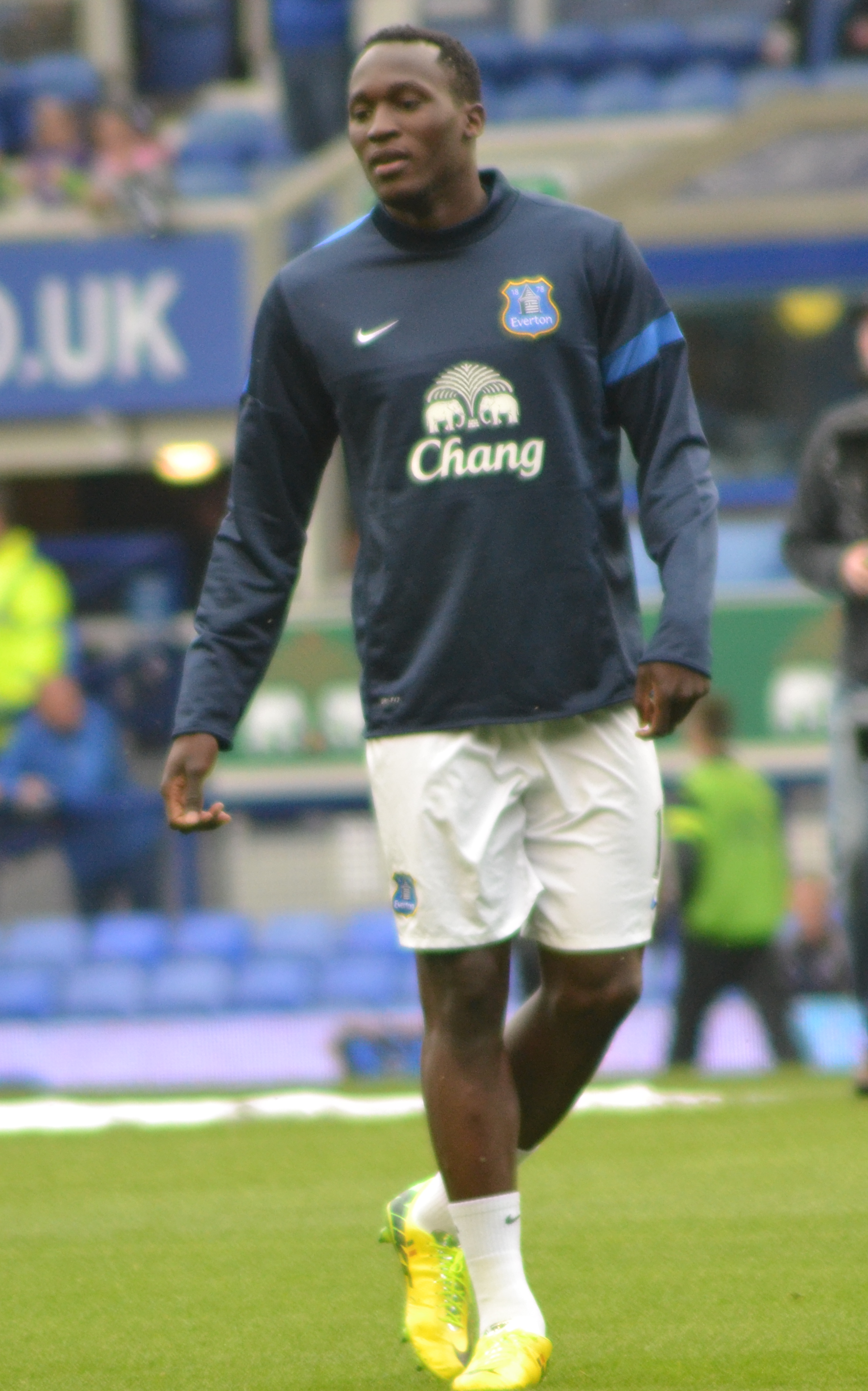 Romelu Lukaku warming-up for Everton.